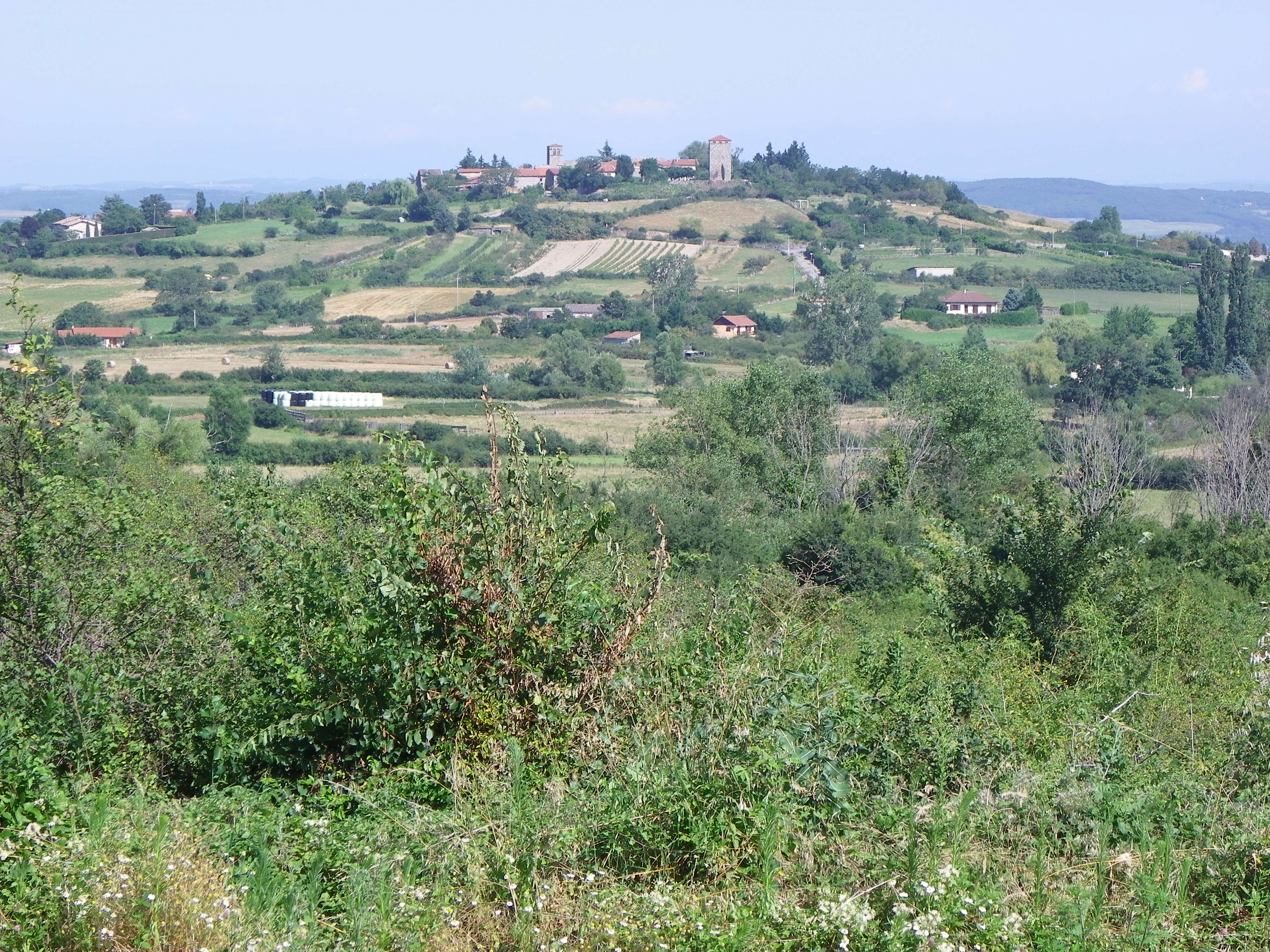 Vieux bourg de Montagny vu de Taluyers